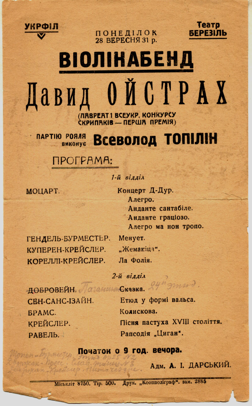 Афиша концерта Давида Ойстраха при участии пианиста Всеволода Топилина,который состоялся в Харькове в помещении театра "Березиль" с карандашными пометками исполненных произведений на бис завсегдатая филармонических концертов,музыканта,композитора и профессора математики Харьковского государственного университета им.В.Каразина Марчевского М.Н.